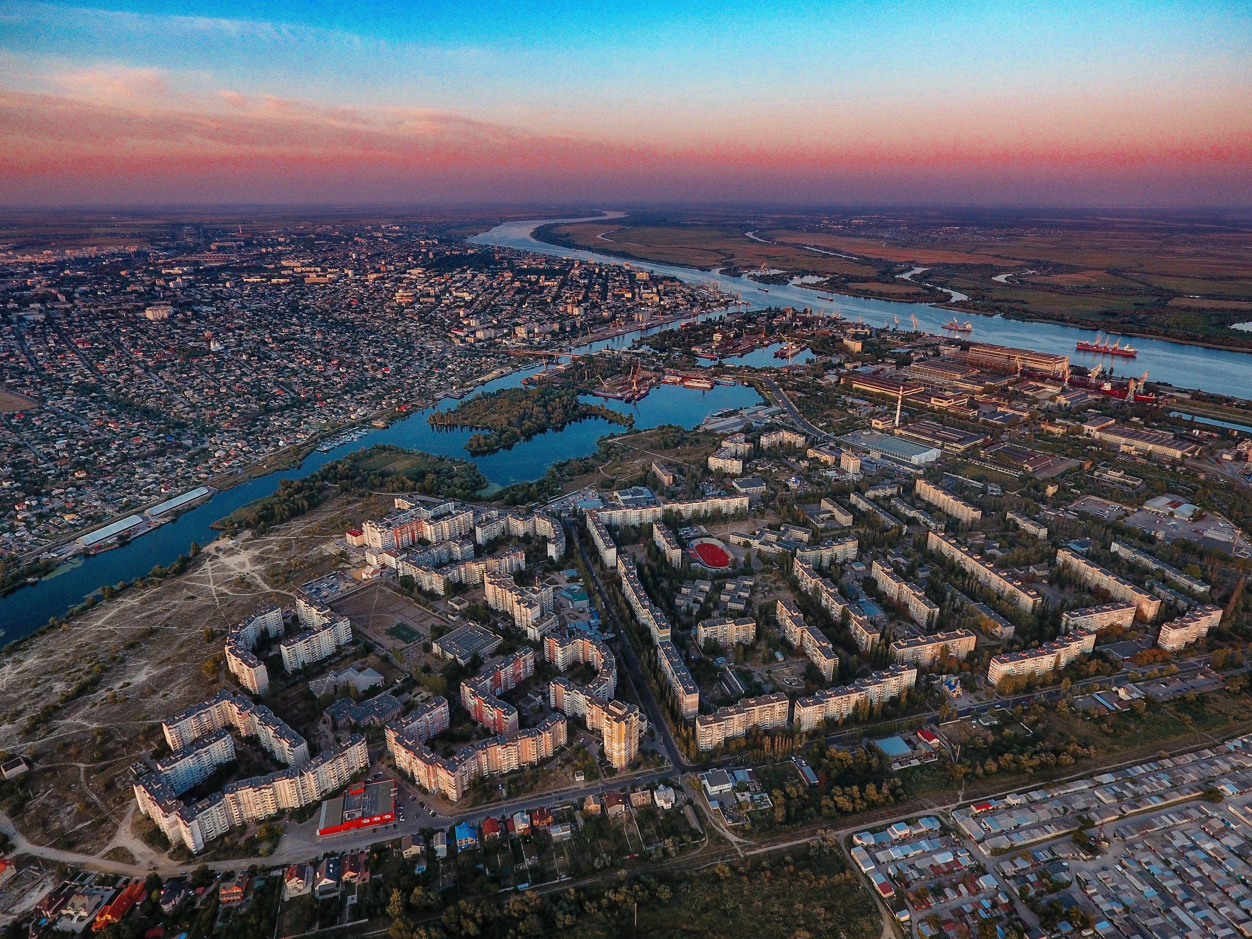 Аэросъемка Карантинного острова - Херсон.